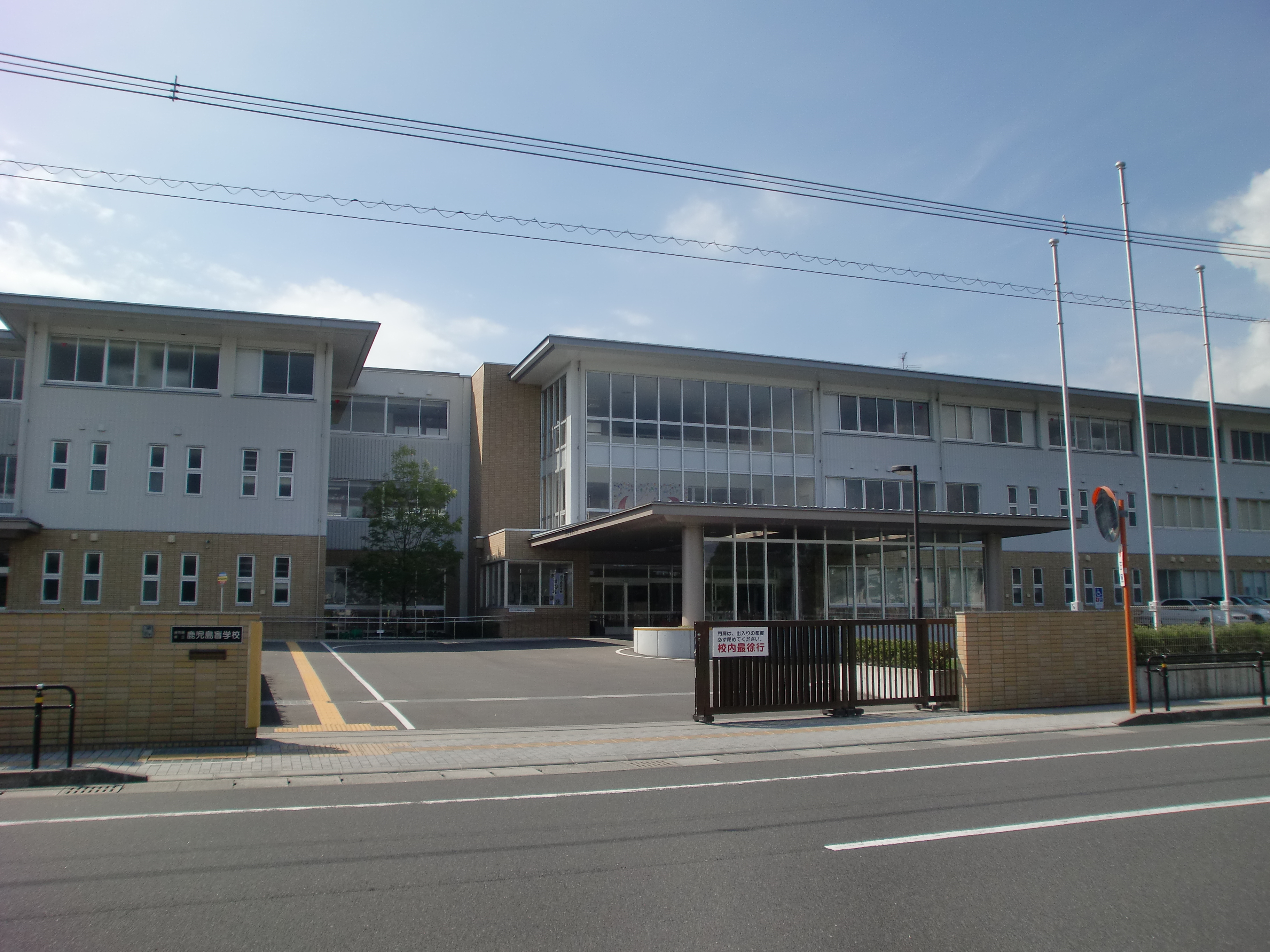 鹿児島県立鹿児島盲学校の外観。